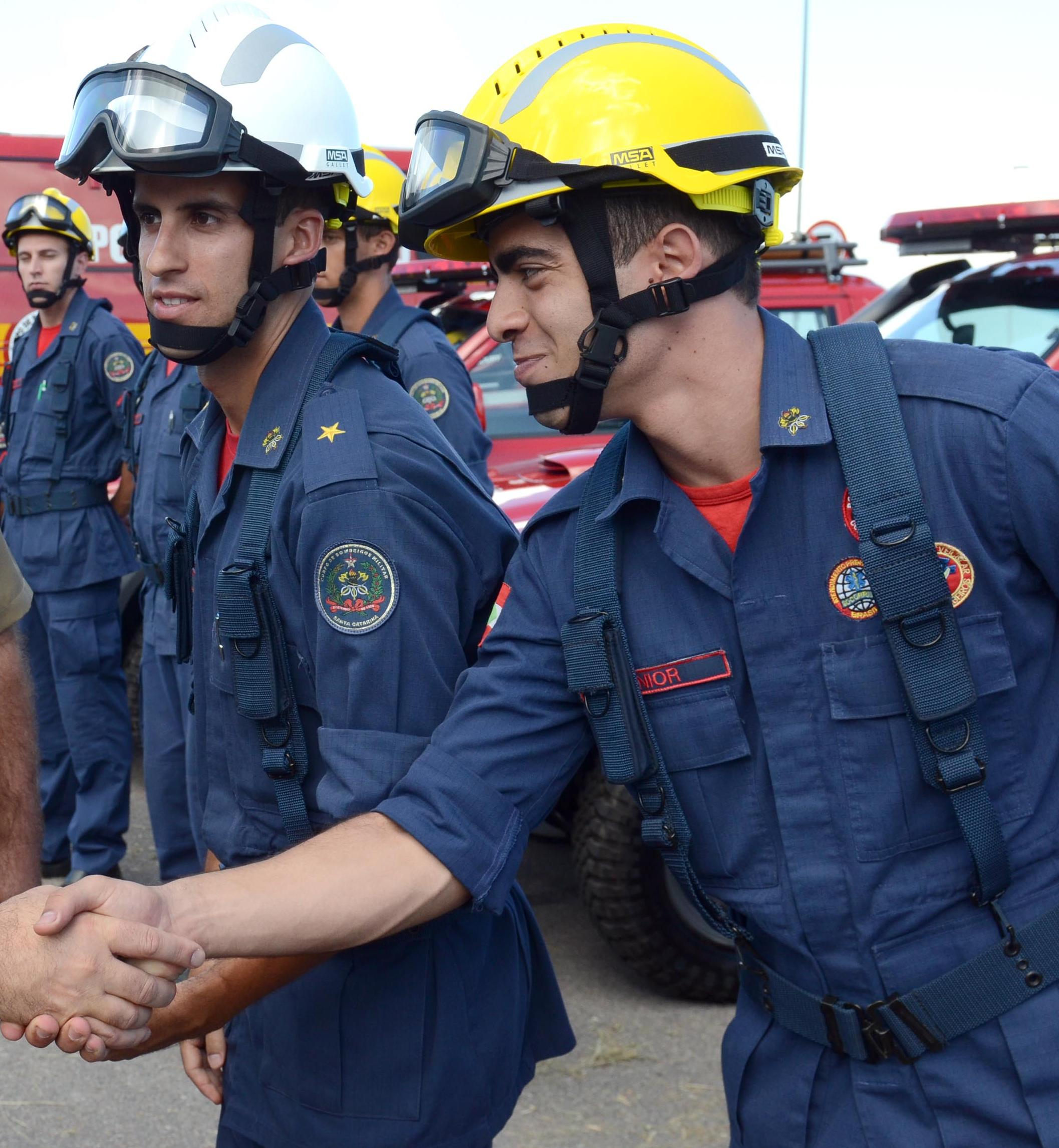 Cuerpo de Bomberos Militar del Estado de Santa Catarina, en Brasil.